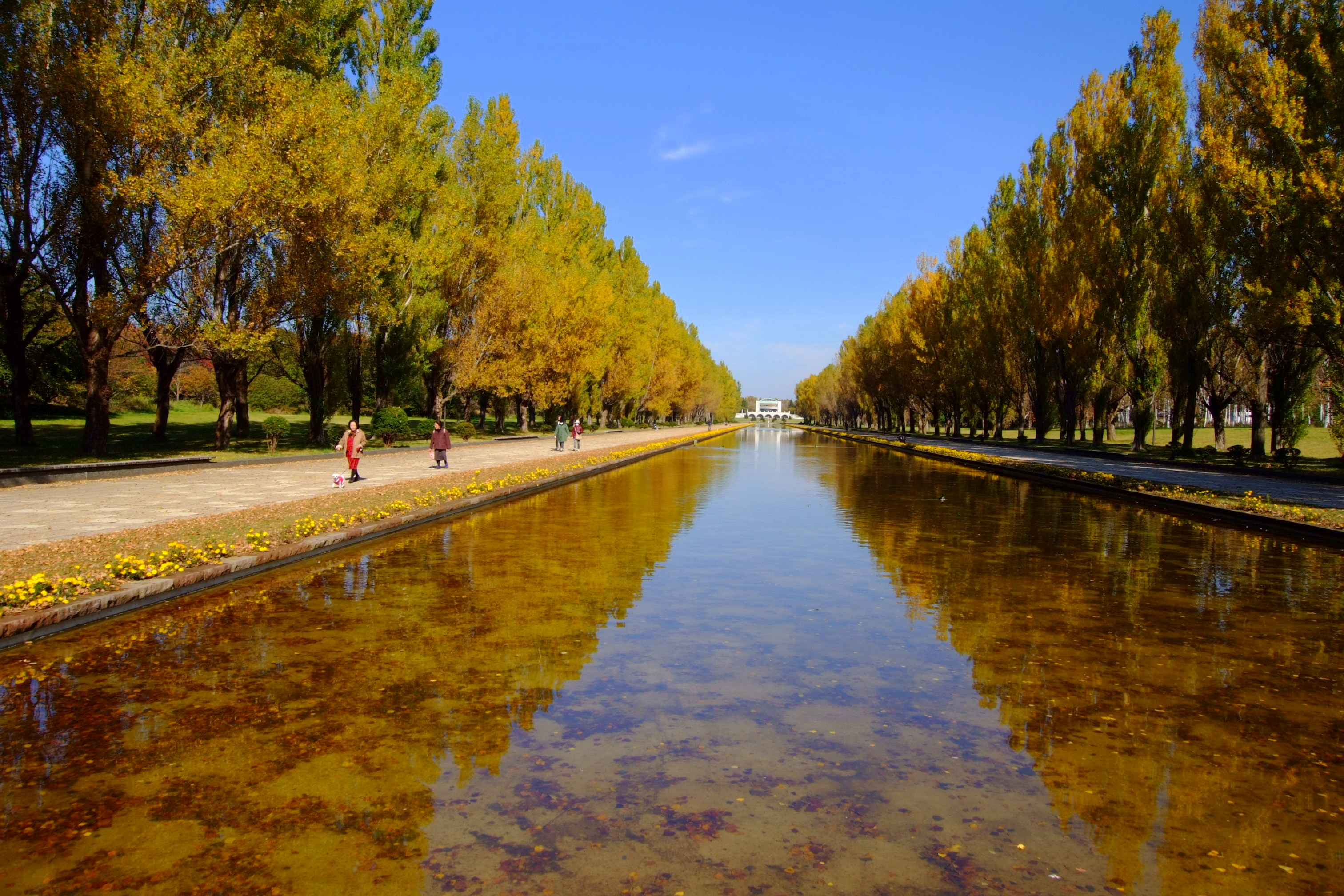 前田森林公園 (Ｍaeda forest park)